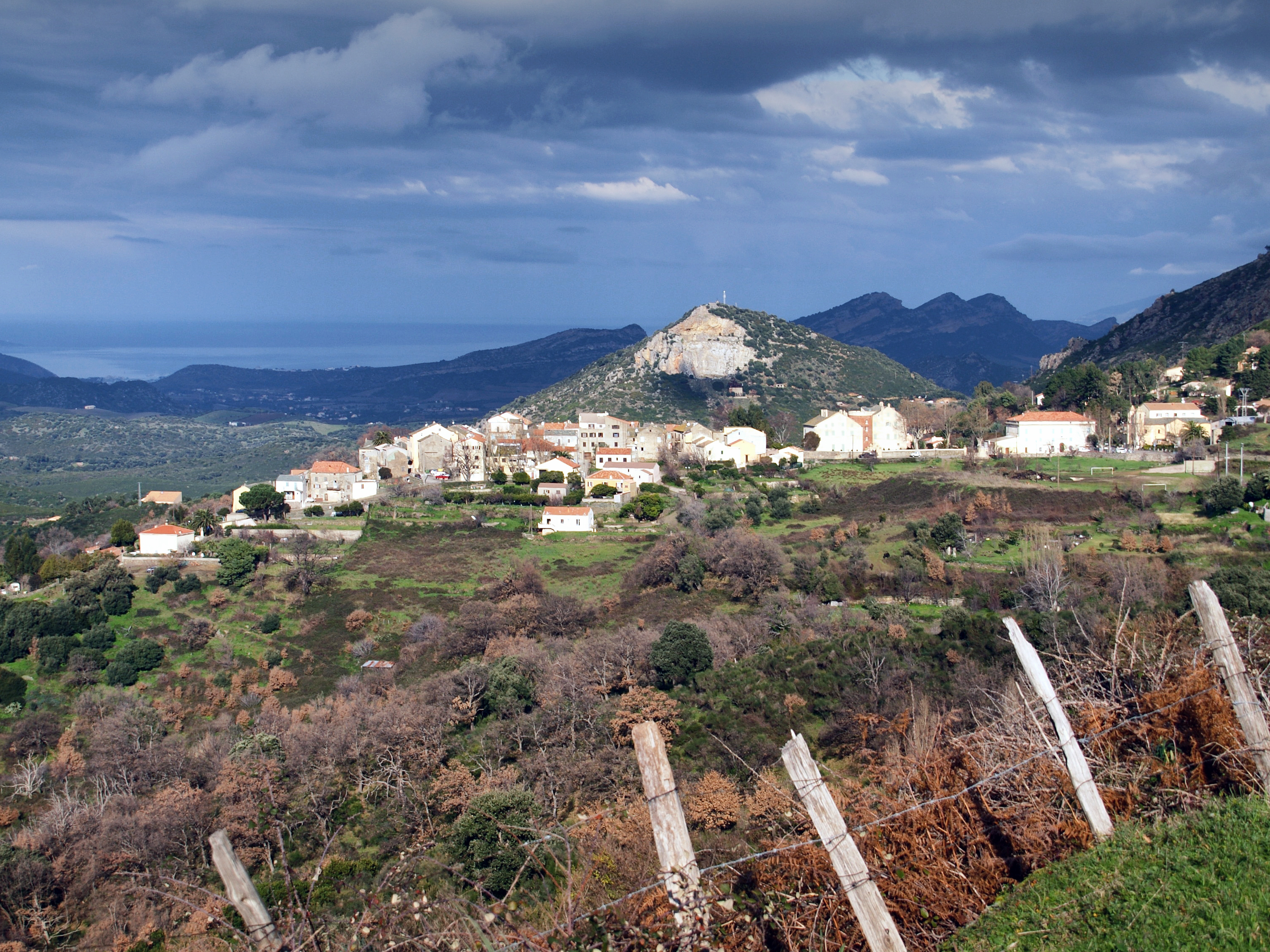 Olmeta-di-Tuda, Nebbio (Corse) - Vue du village